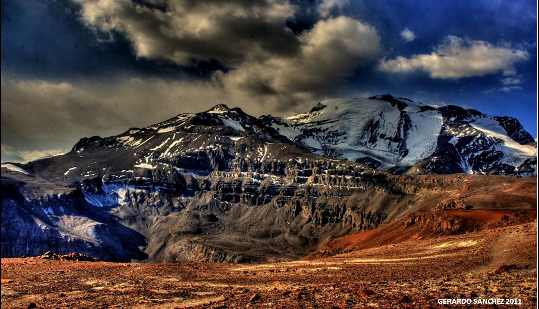 Fotografía de Cerro Leonera y Cerro el Plomo